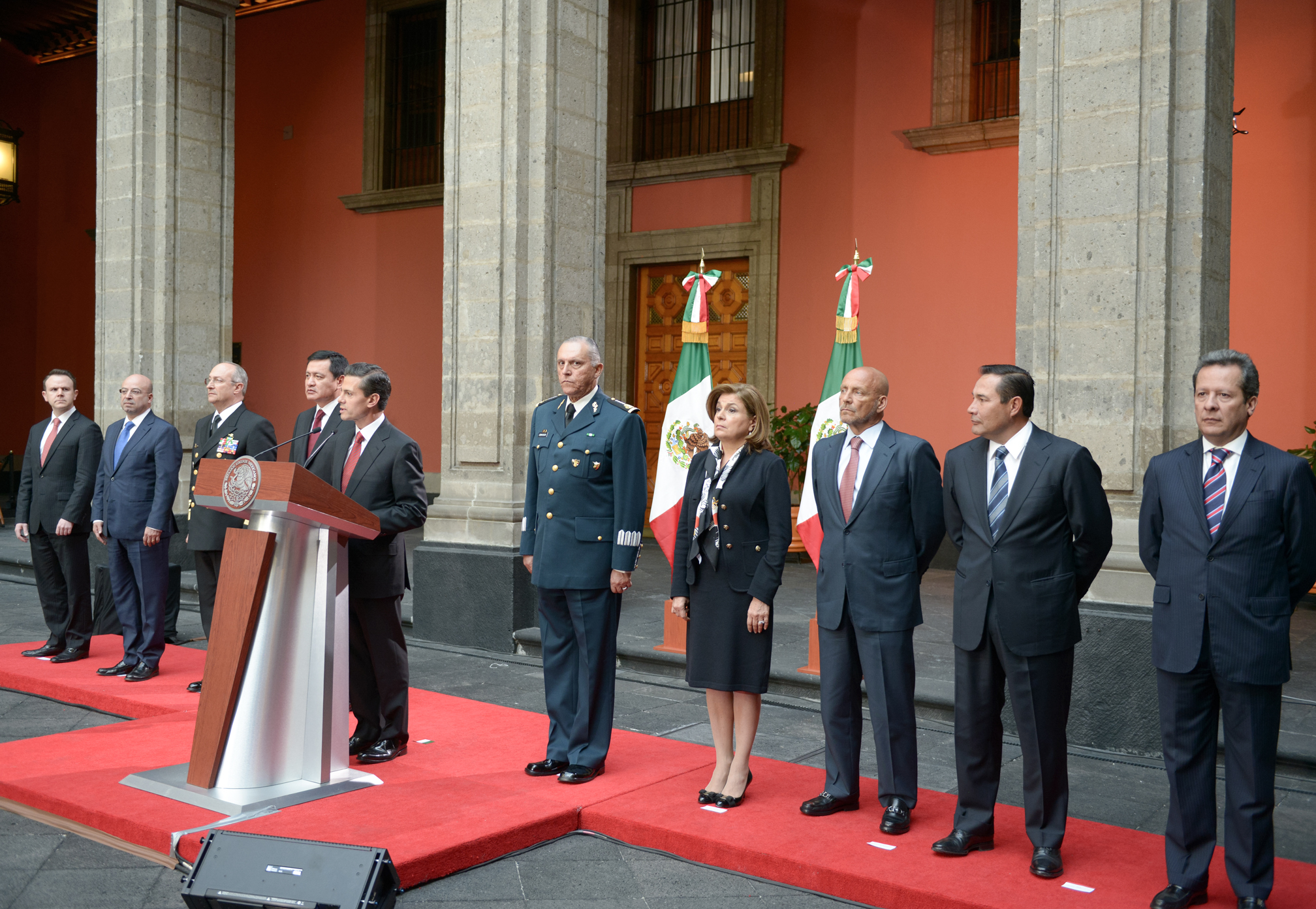 Esta acción contra la impunidad es resultado del trabajo permanente de valiosos elementos de nuestras instituciones que durante días y noches se abocaron a cumplir la misión que les ordené: recapturar al criminal y presentarlo ante la justicia. Palacio Nacional, 8 de Enero del 2016